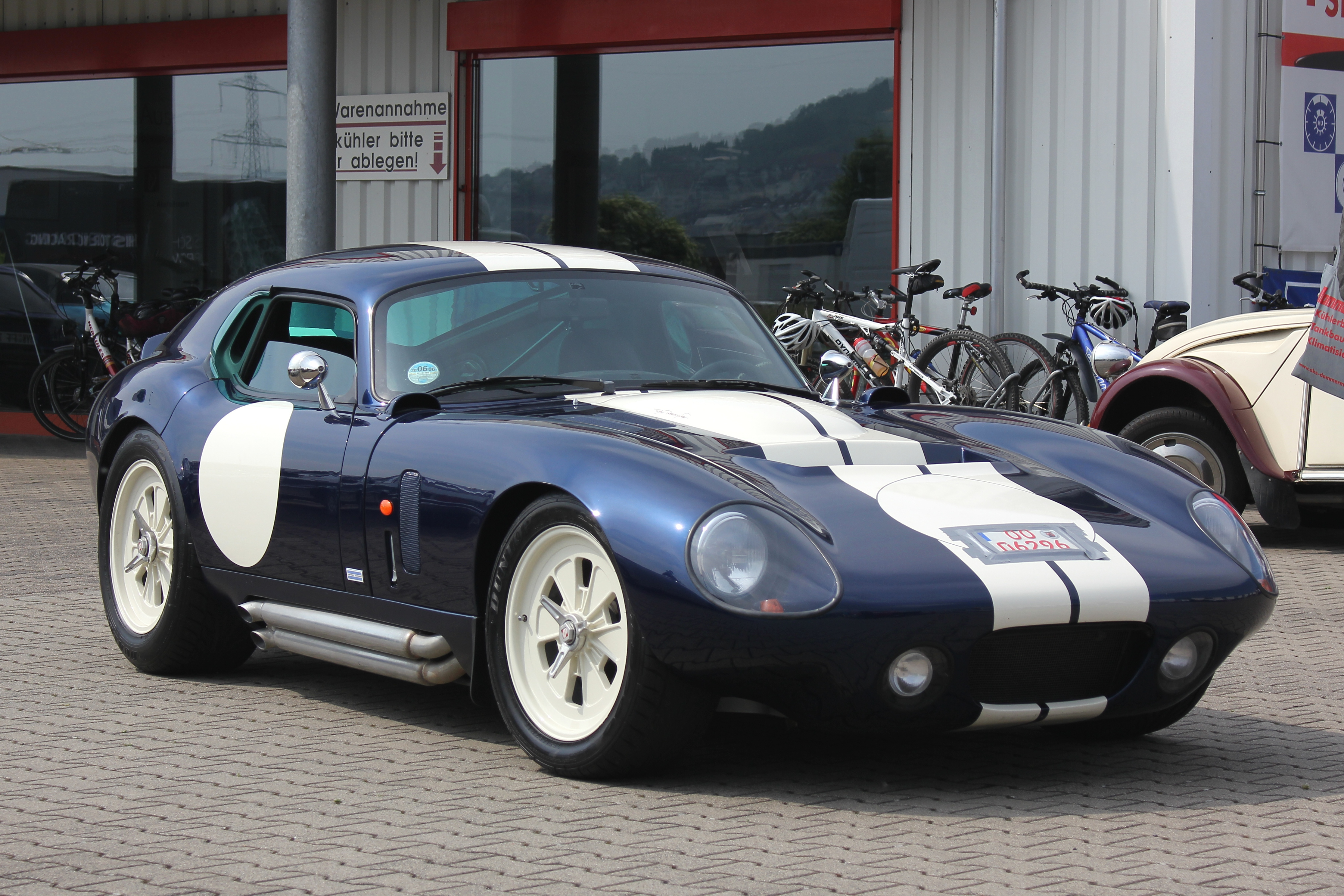 Shelby Cobra Daytona Coupe CSX9000 - Replica von Superformance (fiktives Kennzeichen)